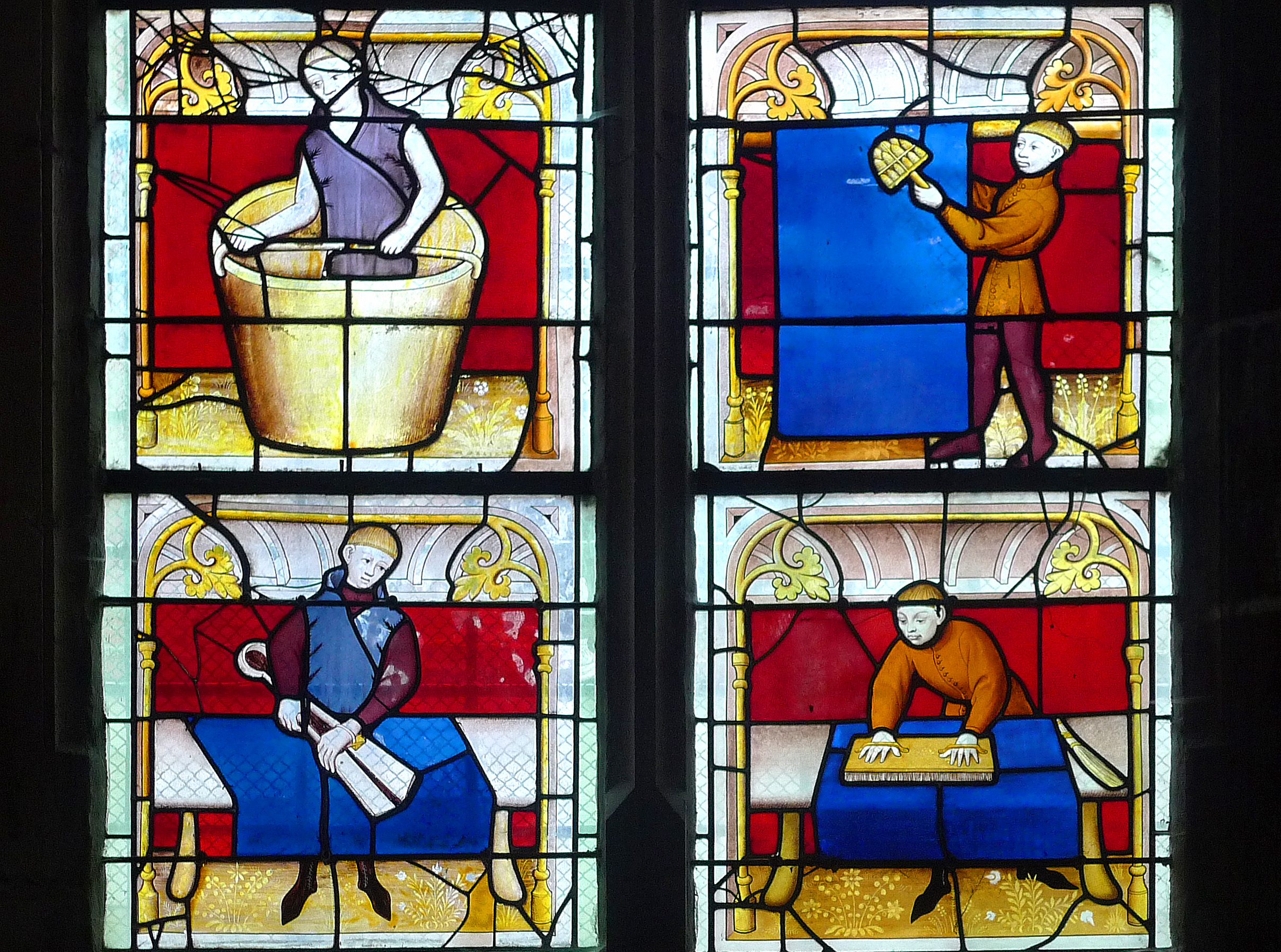 Details des Fensters der Chapelle Saint-Blaise